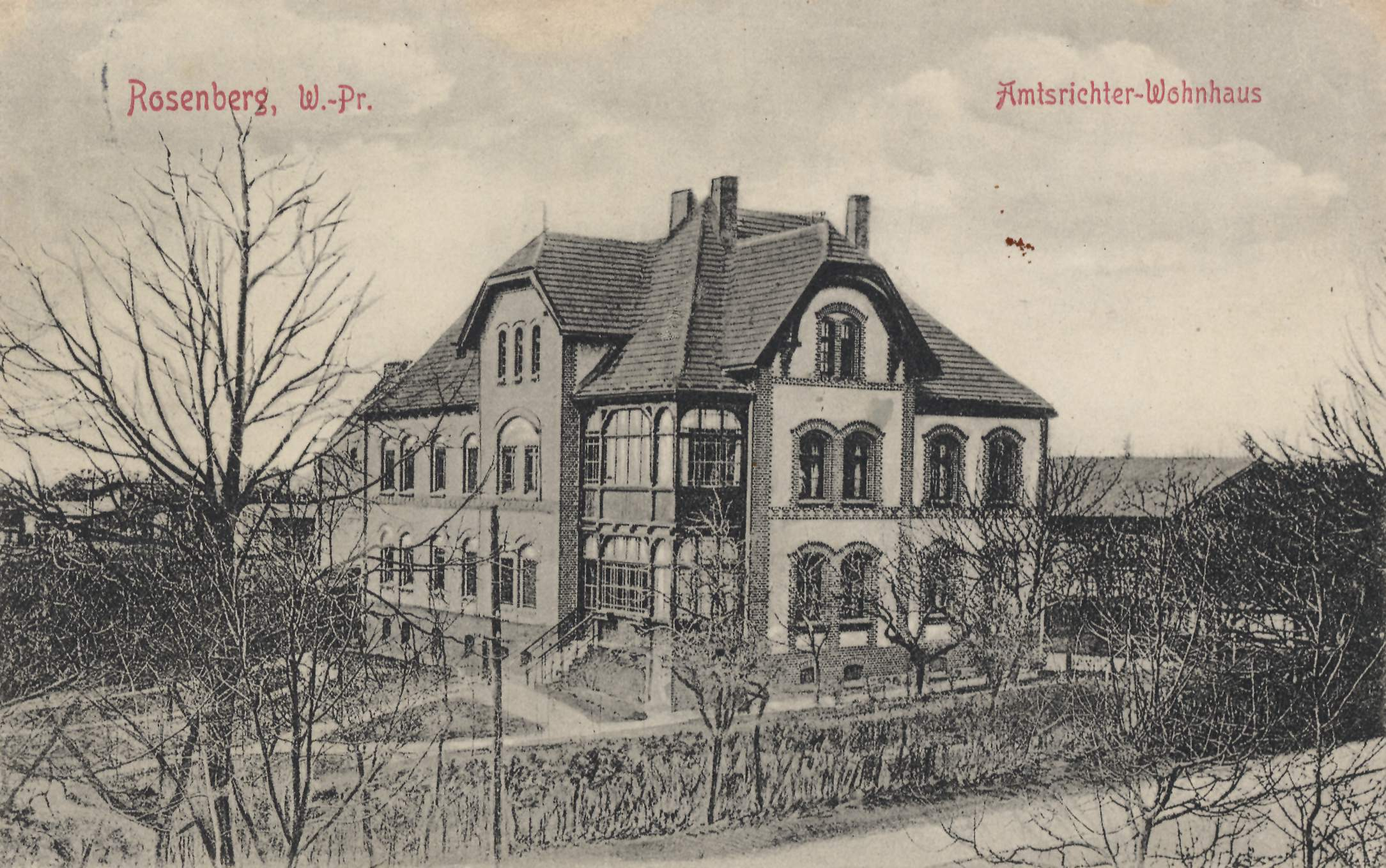 Amtsrichterwohnhaus